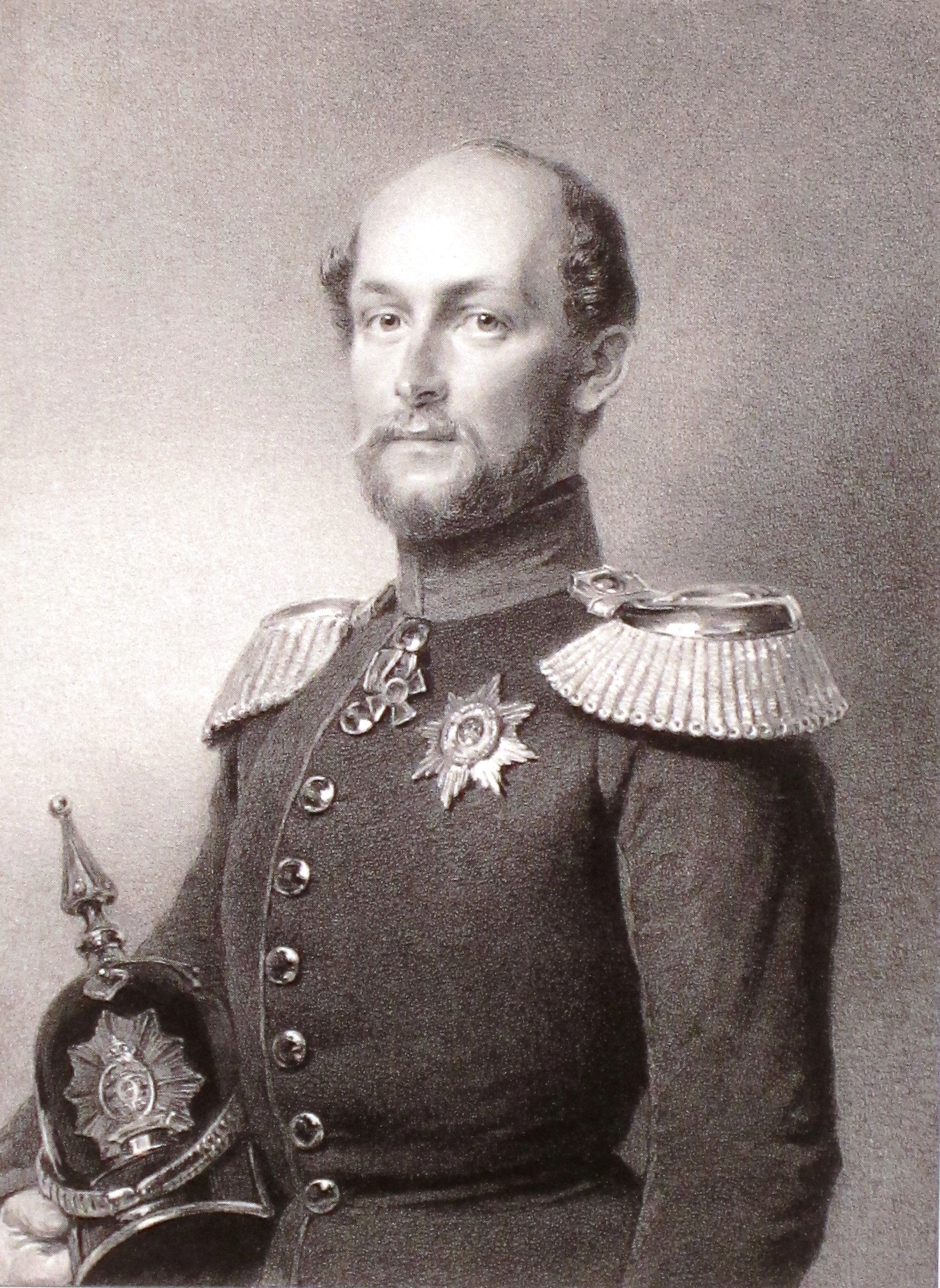 Friedrich Franz II. von Mecklenburg (1823–1883)